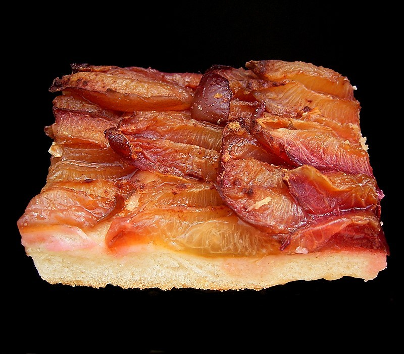 A plum cake